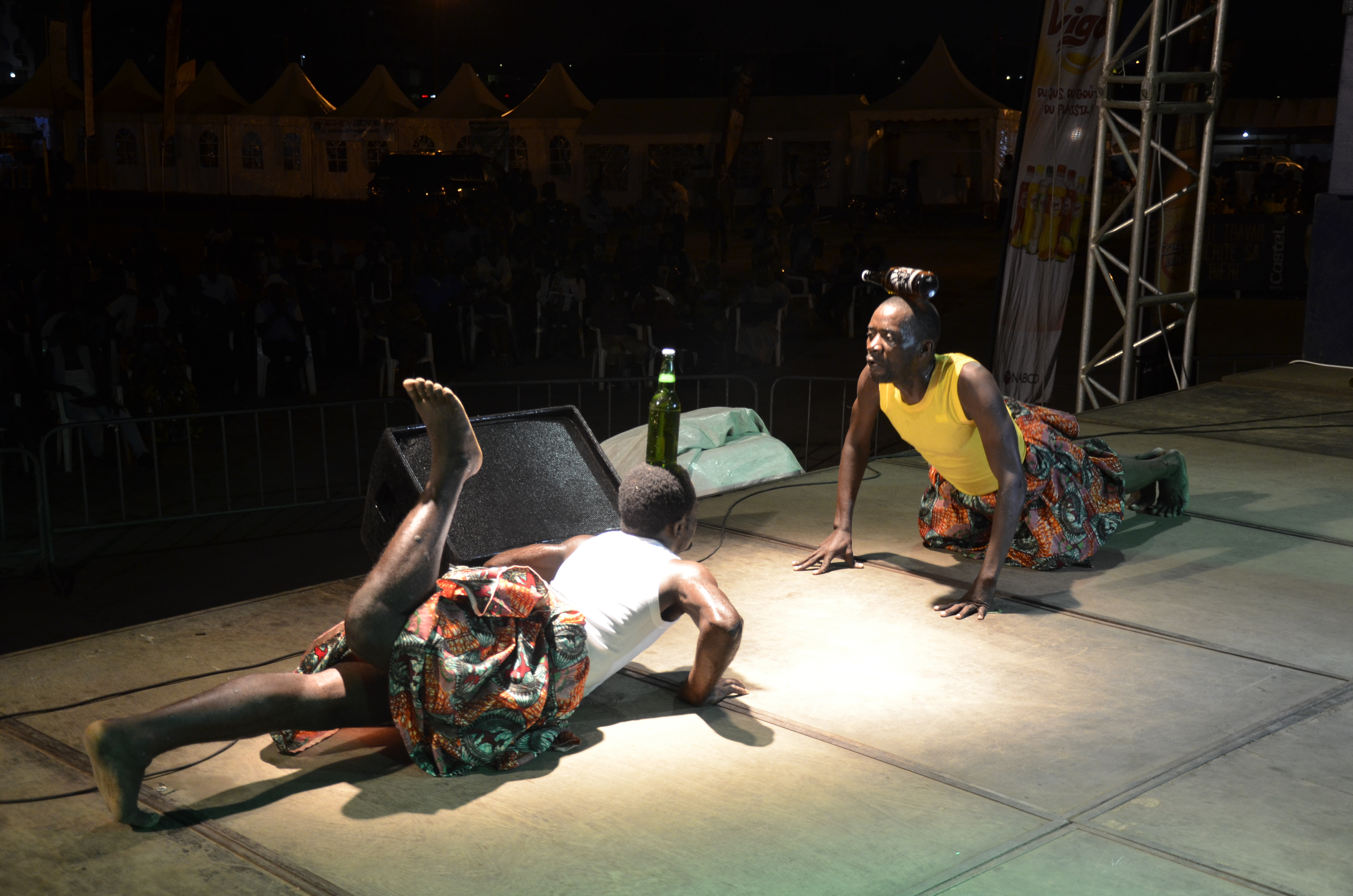 Danse traditionnelle assiko pendant le festival Mbog Liaa This is an image from Cameroon